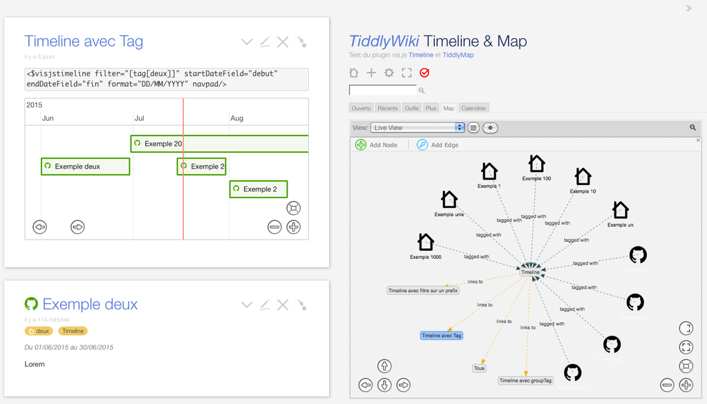 Exemple d'utilisation de TiddlyWiki avec le plugin TiddlyMap (librairie JavaScript vis.js) et le plugin Timeline.